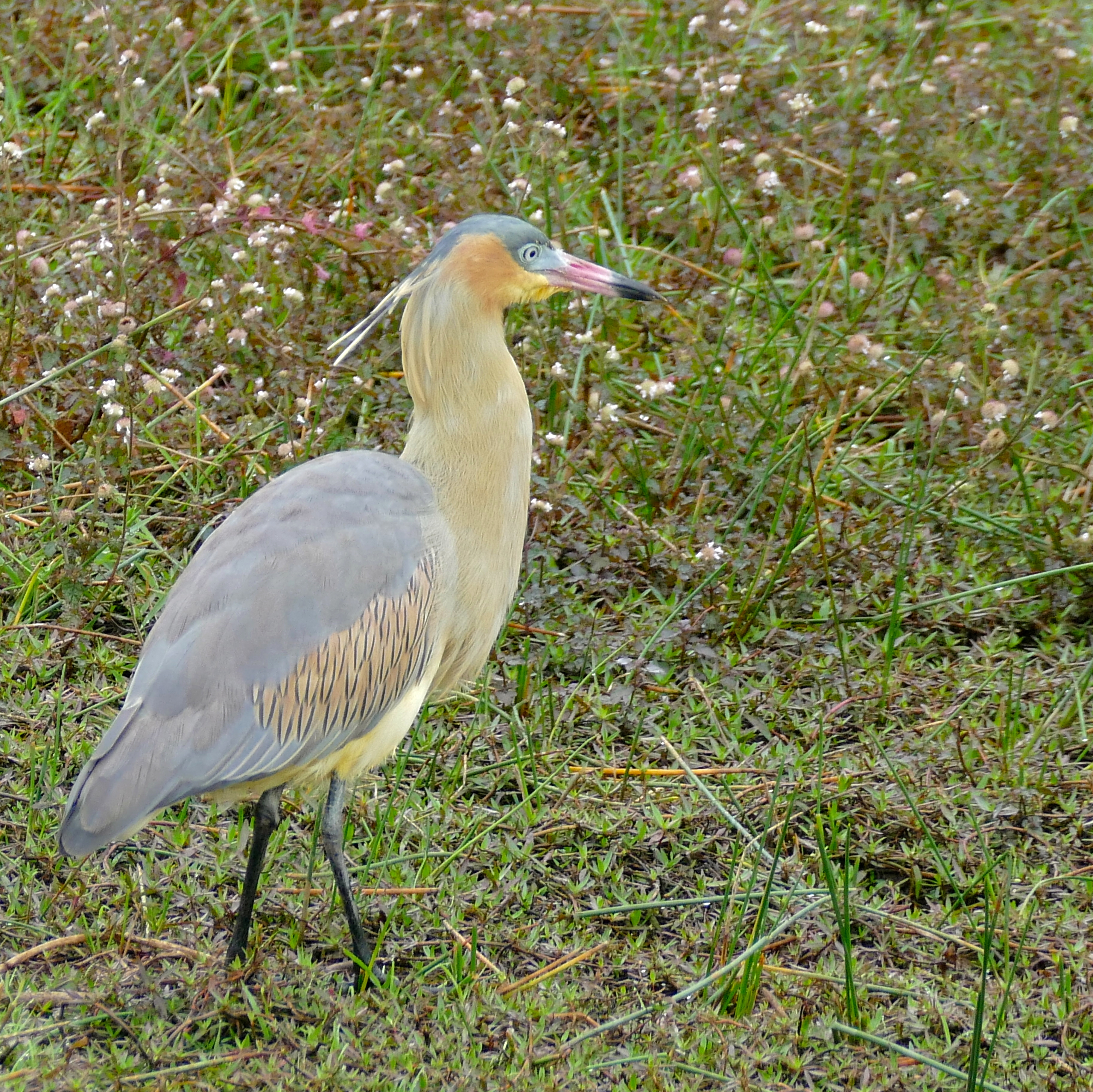 Porto Cercado Road (MT370), Poconé, Mato Grosso, BRAZIL